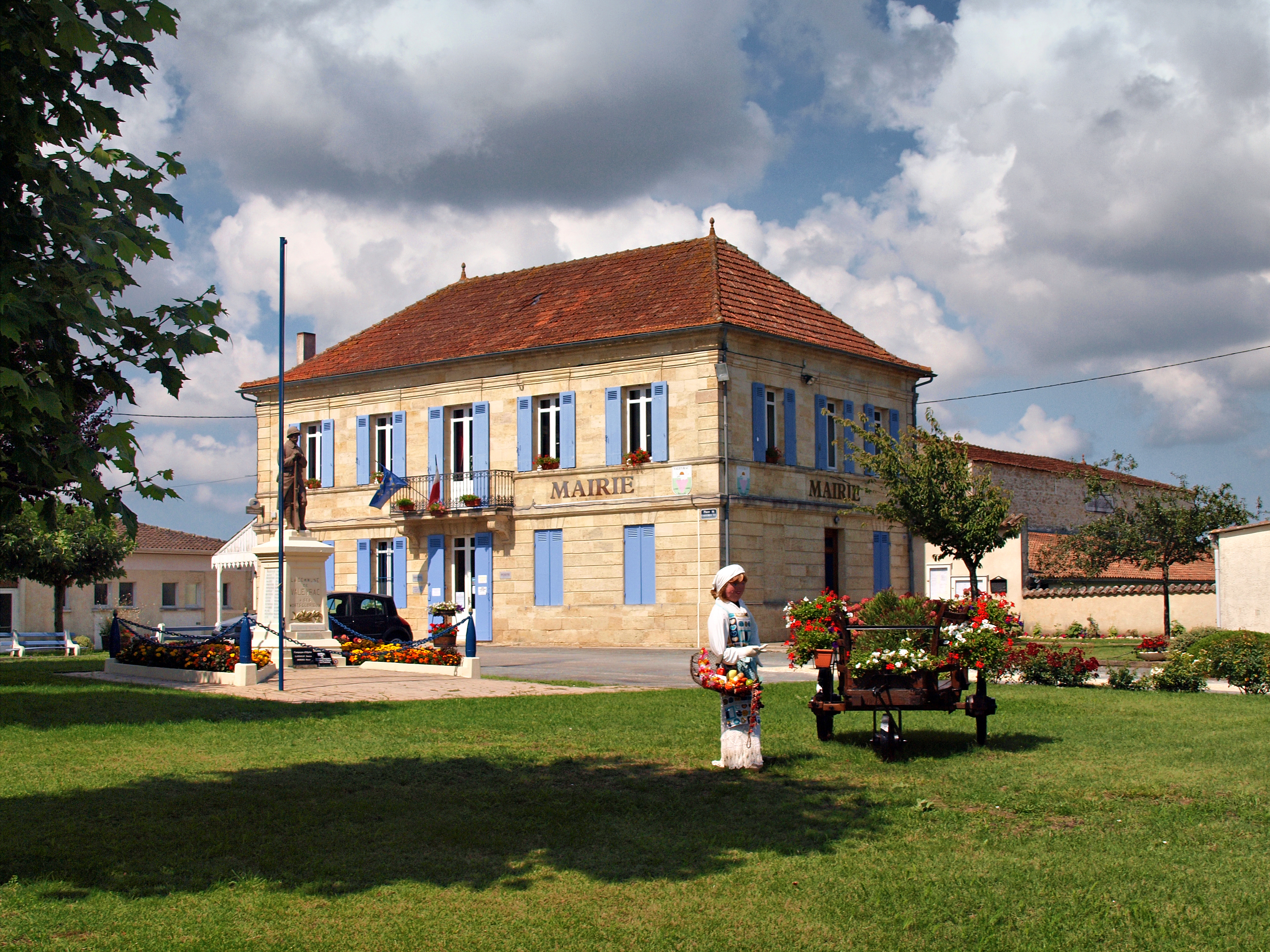 Valeyrac, Gironde (Aquitaine) - Place du village (mairie, monument aux morts)